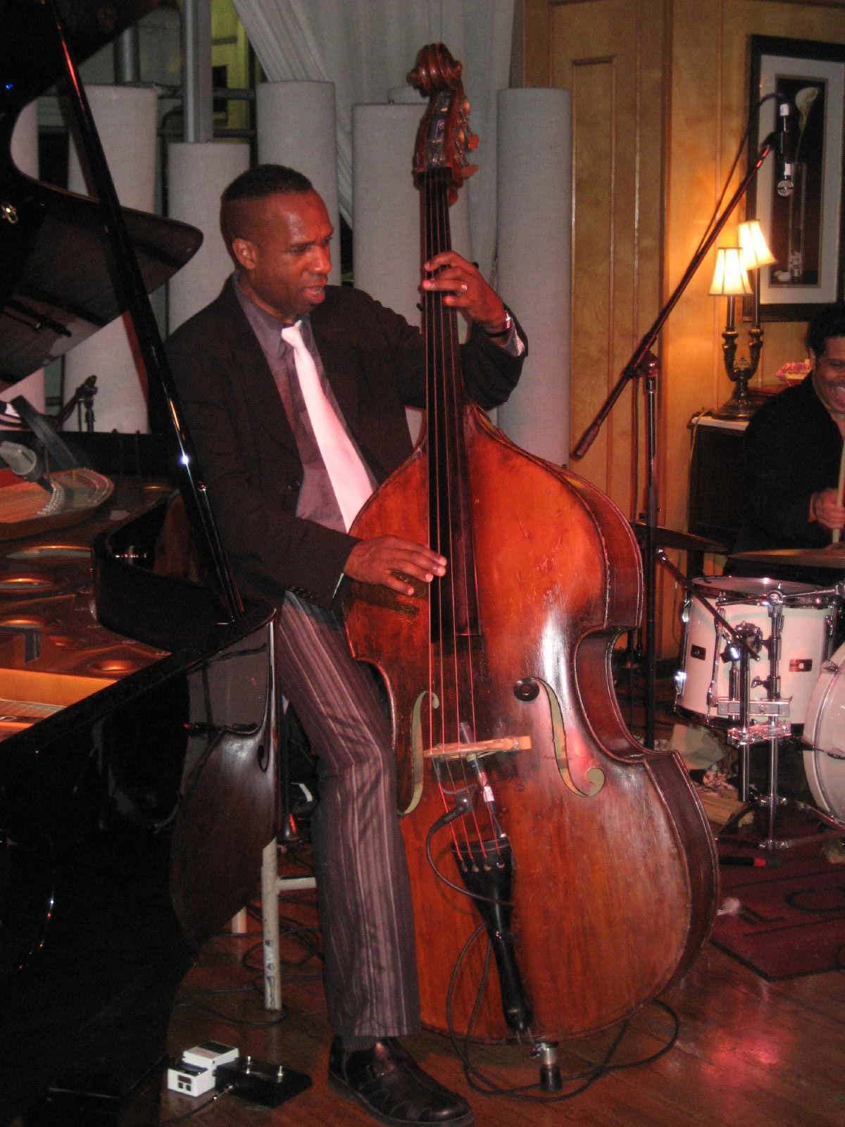 Mike Merritt